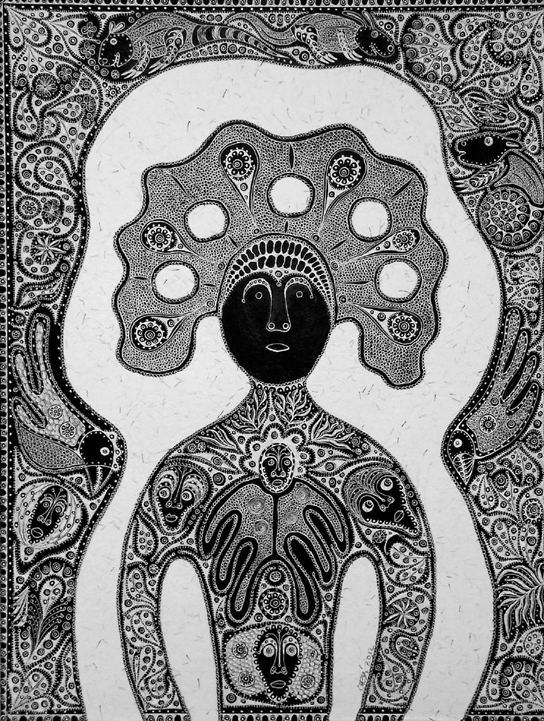 Grande impératrice: dessin-Dentelle de Jean Michel Chesné